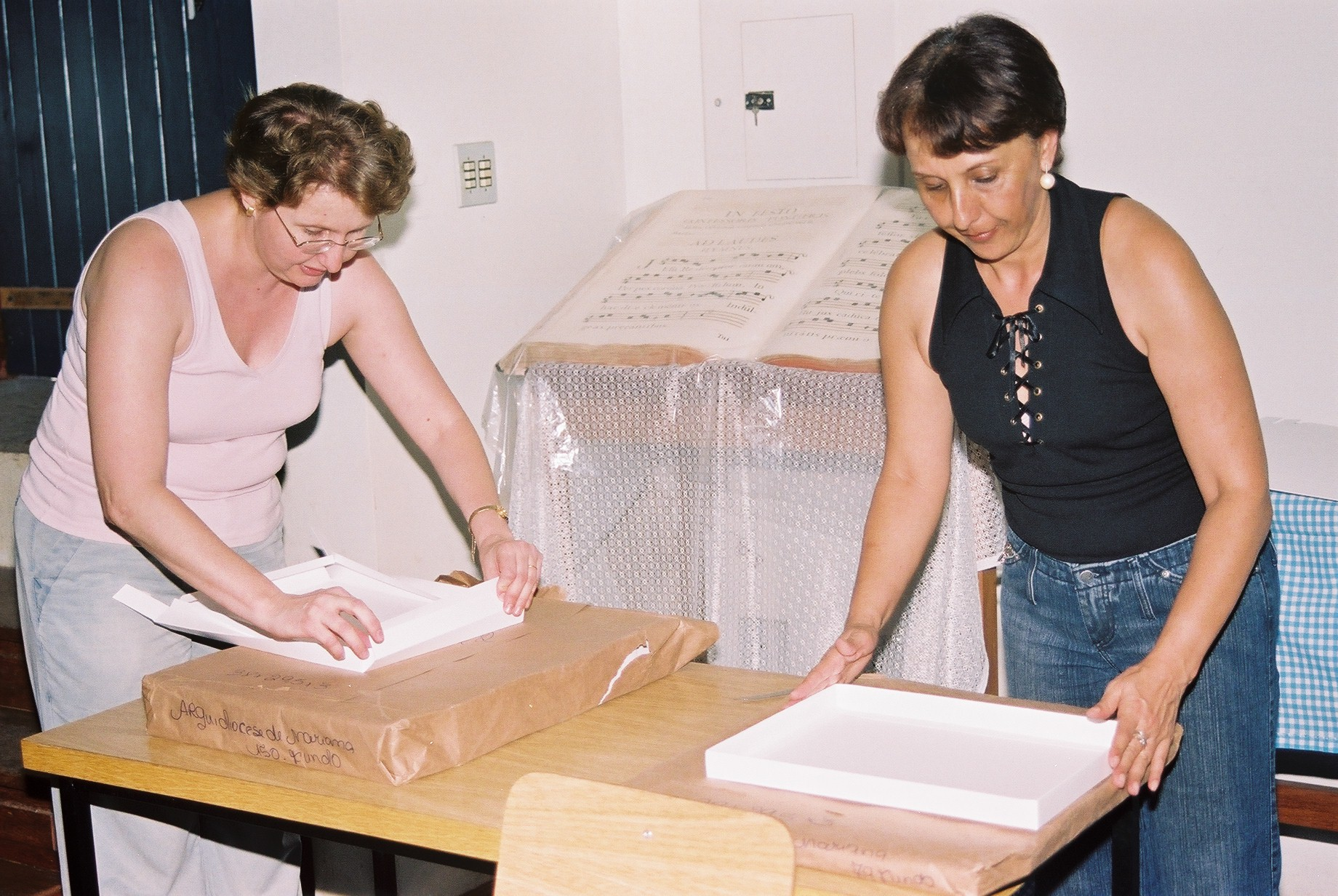 Construção das caixas do Museu da Música de Mariana em 2003